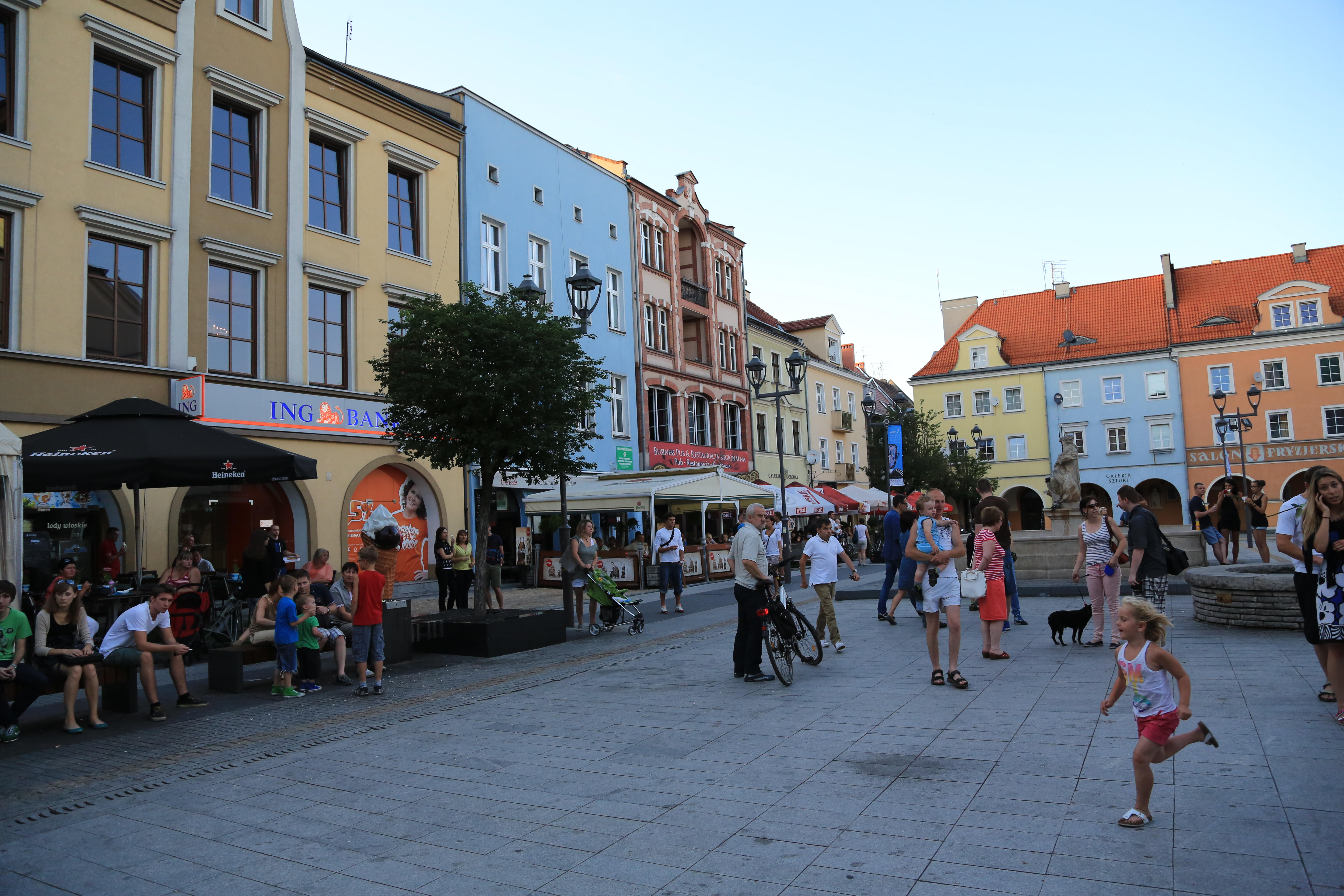 Gliwice